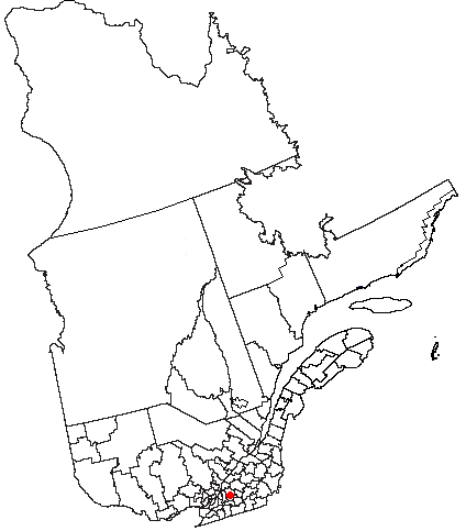 Volapük: Topam in provin: Québec.